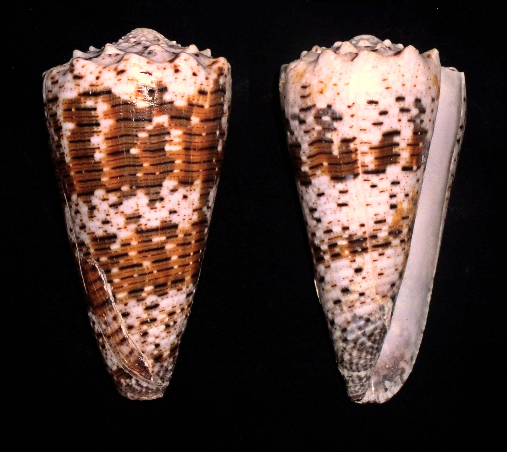 Imperial Cone - Conus imperialis